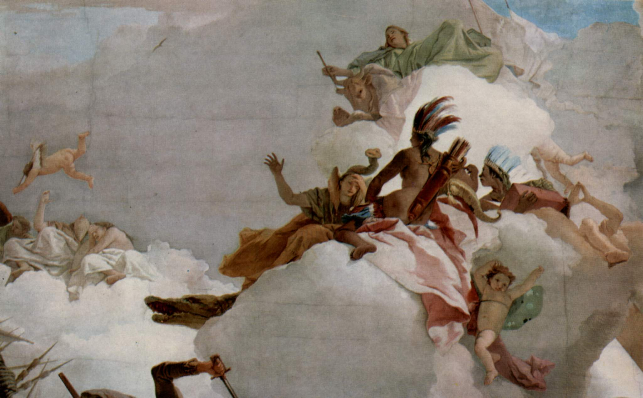 detail